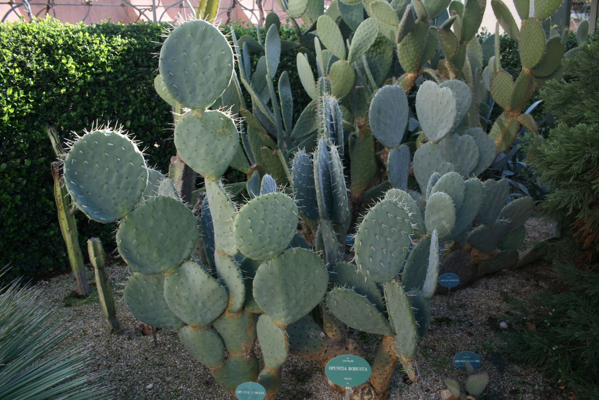 Opuntia-gyűjtemény (Real Jardín Botanico, Madrid)